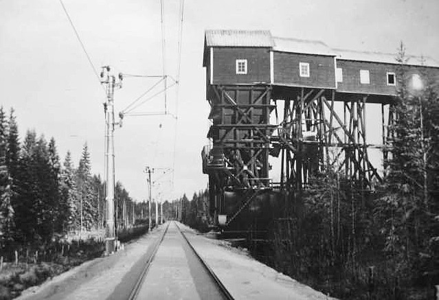 Bergslagernas Järnvägar: Tyskgruvans utlastning